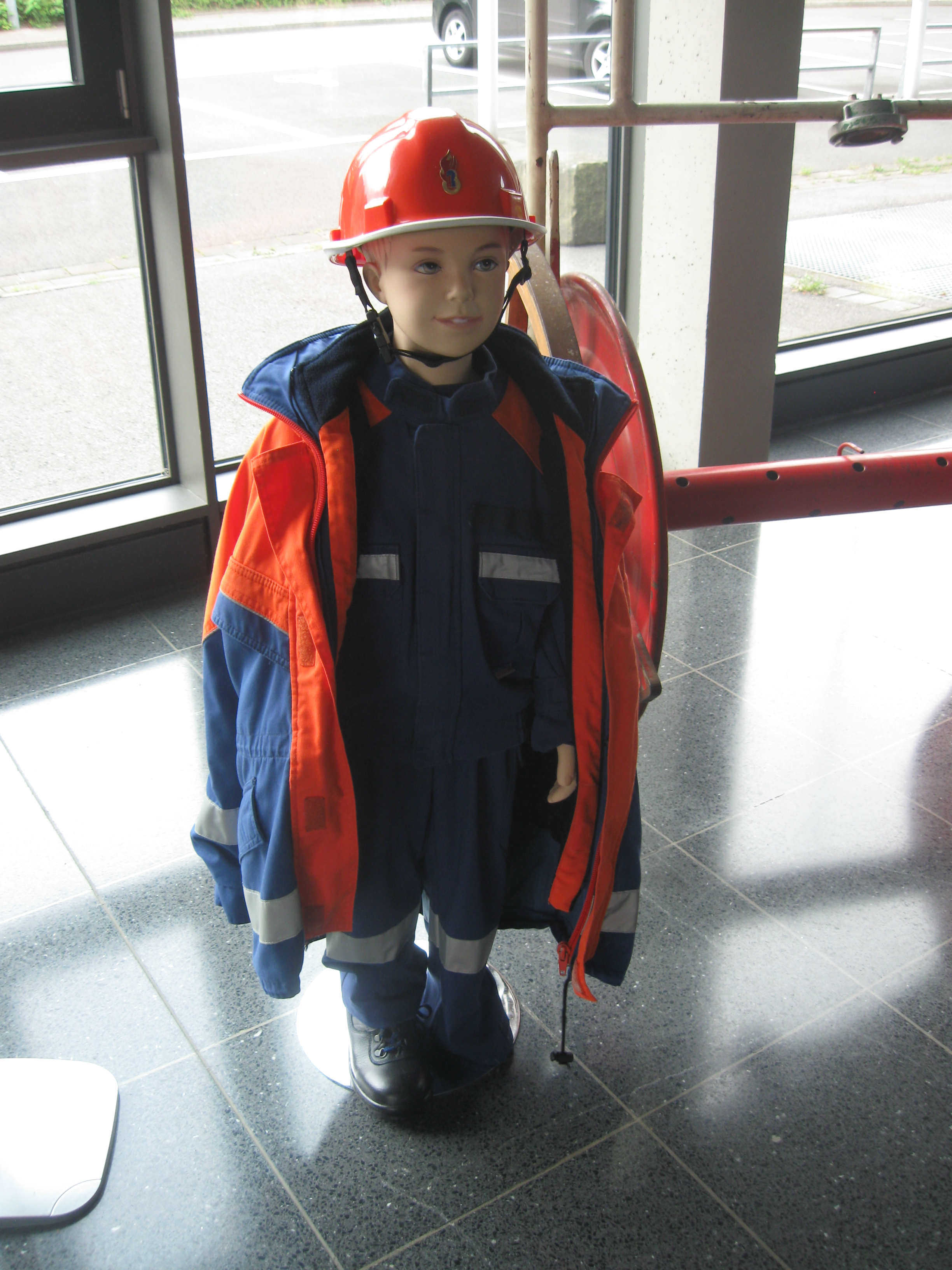 Ausstellung im Foyer der Zentralen Feuer- und Rettungswache 2 (ZFRW Gelsenkirchen) an der Seestraße: aktuelle Gelsenkirchener Hauptfeuerwache (Einweihung 2005).